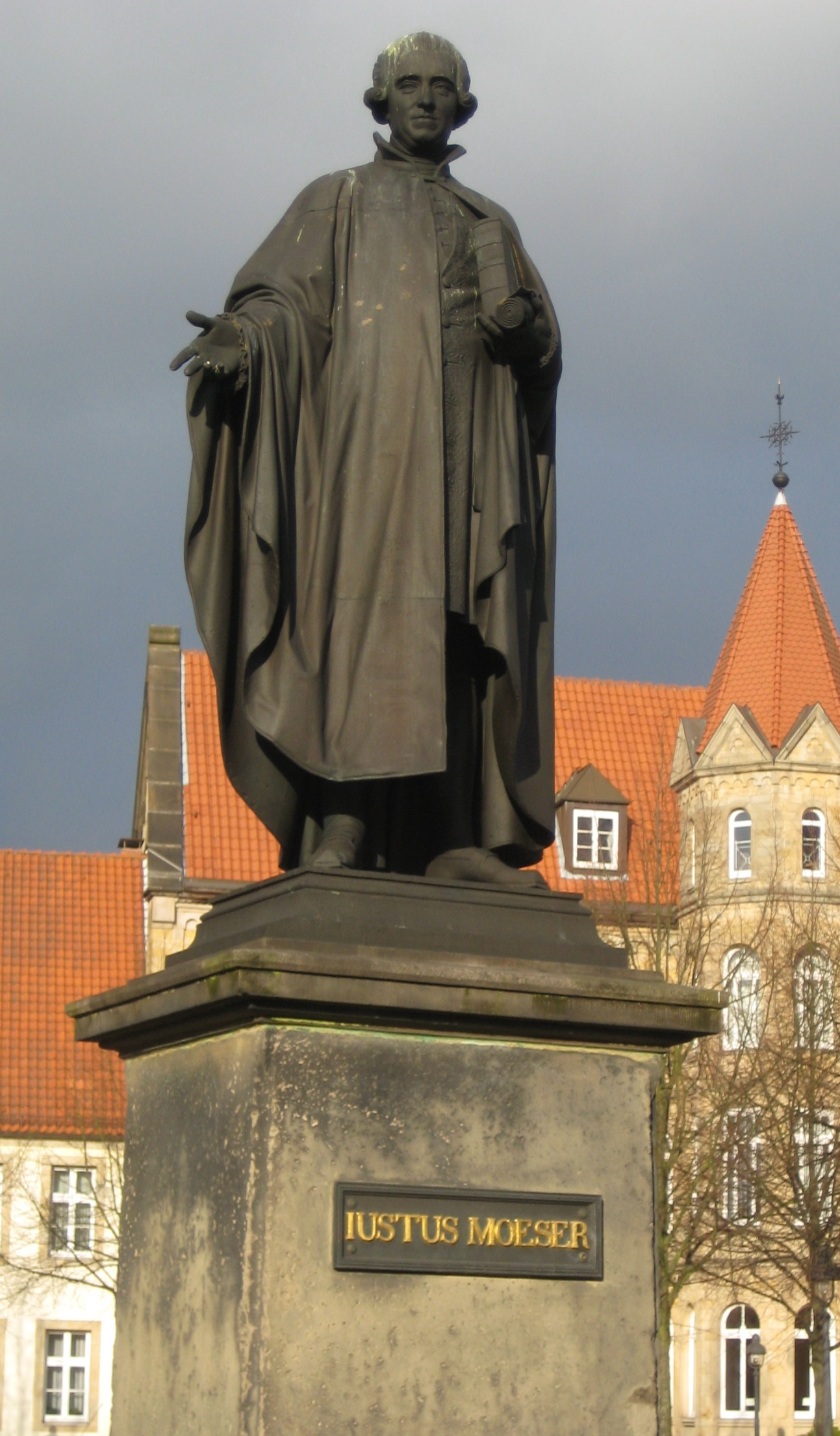 Denkmal für Justus Möser von Friedrich Drake (1805-1882) in Osnabrück, 1836 entüllt, ursprünglich mit Gitter umgeben